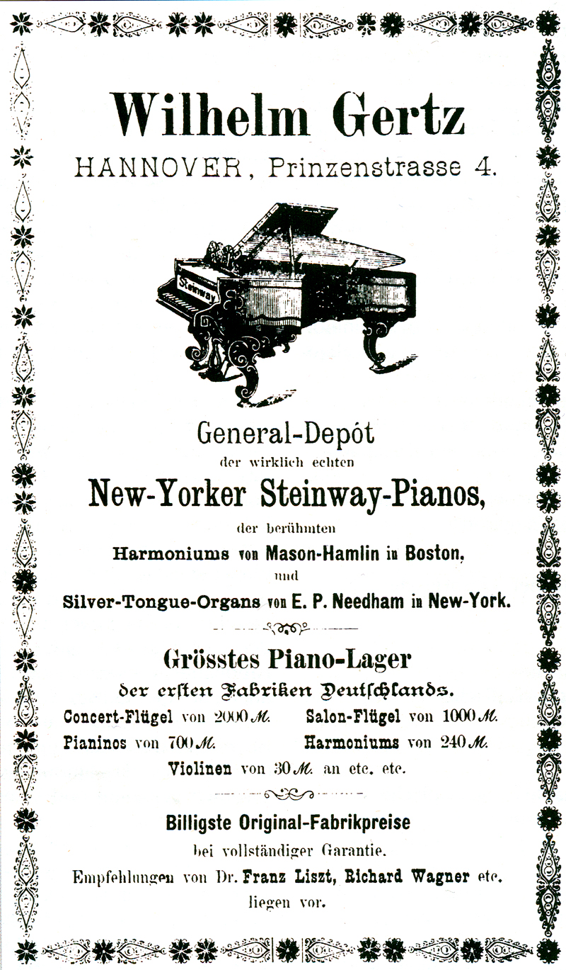 Annnonce im Adressbuch der Fabriken und Gewerbebetriebe der Provinz Hannover von dem späteren Klavierfabrikanten Wilhelm Gertz, hier noch unter seiner Adresse Prinzenstraße 4 in Hannover. Bereits zu dieser Zeit konnte Gertz „Empfehlungen von Dr. Franz Liszt, Richard Wagner etc.“ seiner Kundschaft vorhalten ...